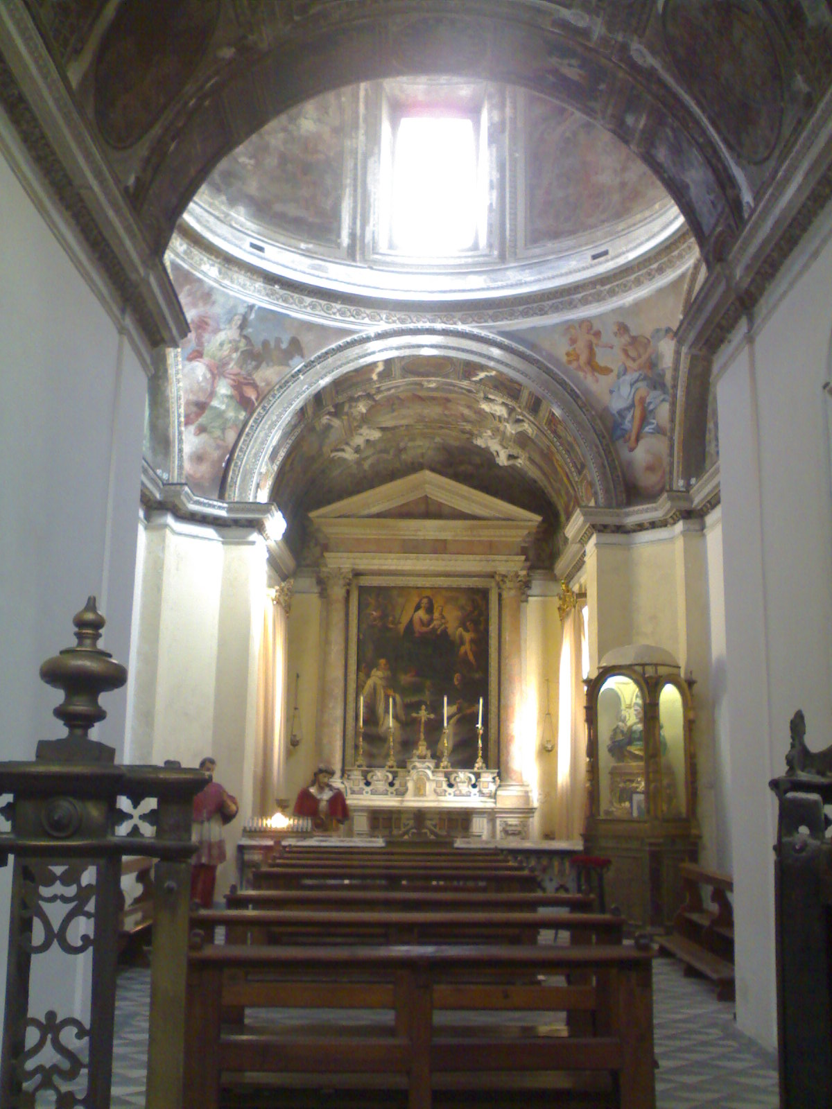 chiesa di sant'anna dei lombardi (napoli)